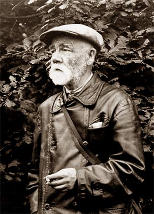 Иван Иванович Спрыгин, ботаник, исследователь природы Среднего Поволжья, Пензенской области, Средней Азии и Казахстана, один из основоположников природоохранного дела в России. Доктор биологических наук, профессор.